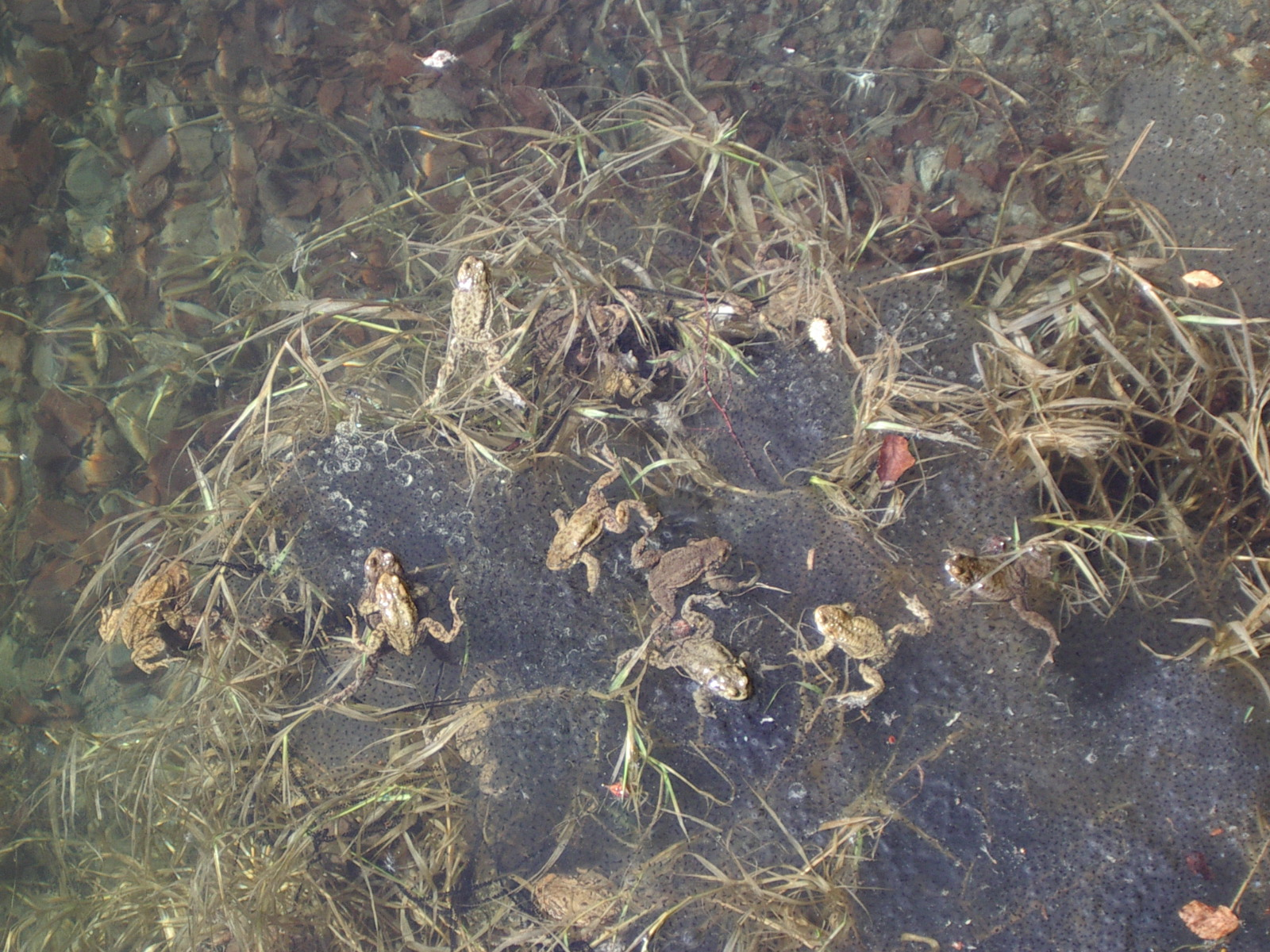 Crapauds au lac du Ballon Source: photo perso Rémi Stosskopf